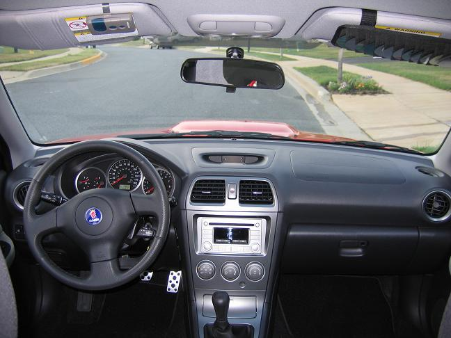 Saab 9-2X interior